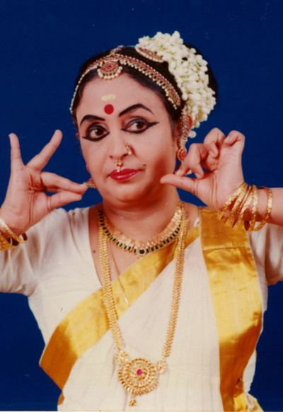 संस्कृतम्: kalamadalam kalyani kutty